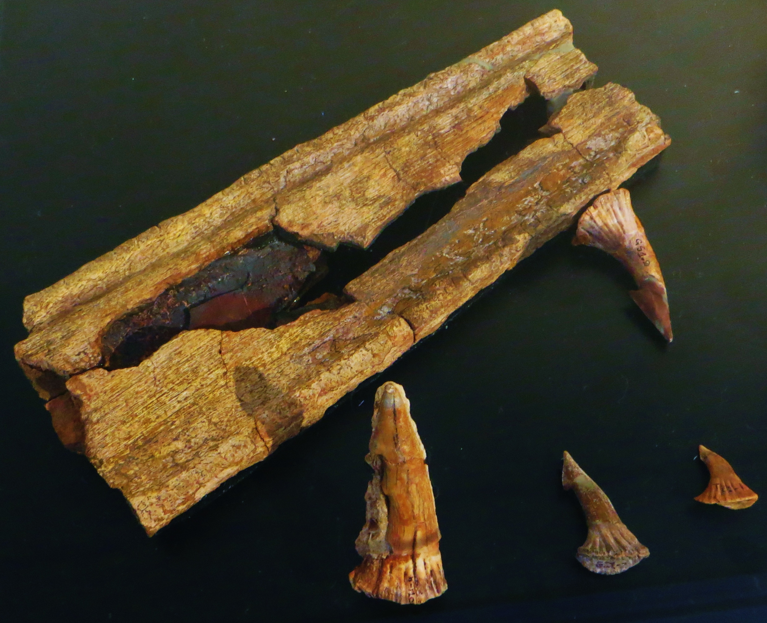 Fossil - Took the picture at Palazzo Dugnani, Milano